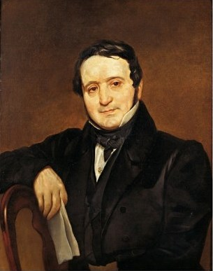 Ritratto dell'accademico braidense Ignazio Fumagalli